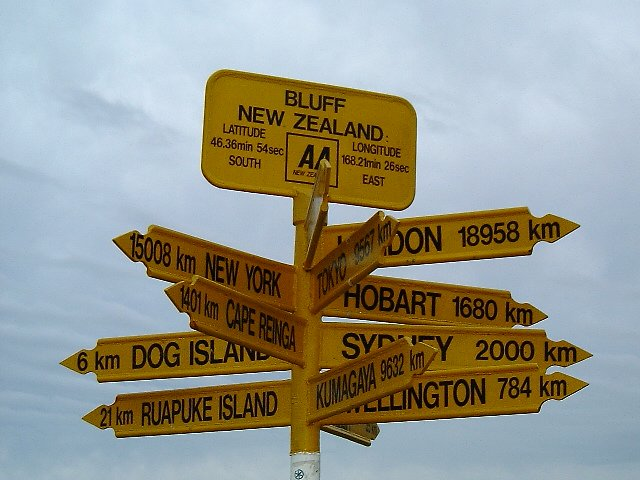 Bluff Sign Post, New Zealand